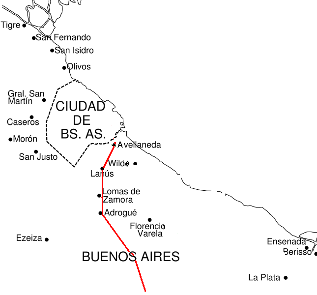 Trayecto aproximado de la Avenida Hipólito Yrigoyen